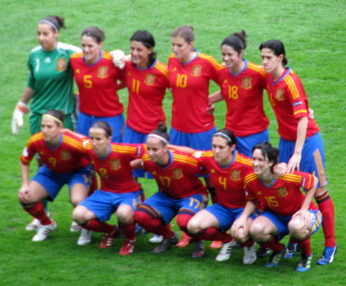 Spanische Nationalmannschaft. V.l.n.r. obere Reihe: Ainhoa Tirapu de Goñi, Ruth García García, Sandra Vilanova Tous, Adriana Martin Santamaria, Marta Torrejón Moya, Miriam Dieguez de Oña, untere Reihe: Verónica Boquete Giadans, Sonia Bermúdez Tribano, Marta Corredera Rueda, Melisa Nicolau Martin, Silvia Meseguer Bellido.